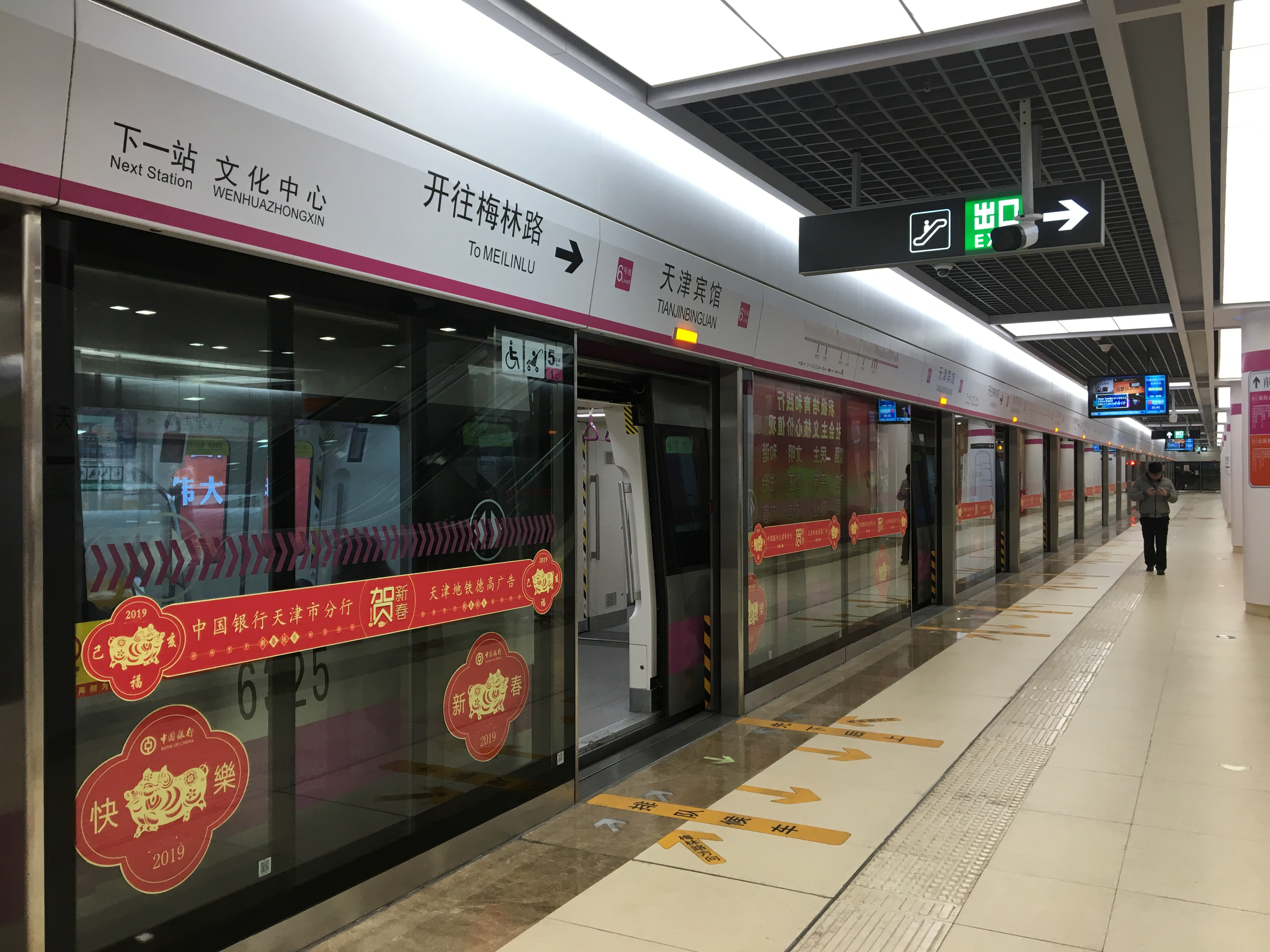 天津地铁天津宾馆站6号线往梅林路方向站台